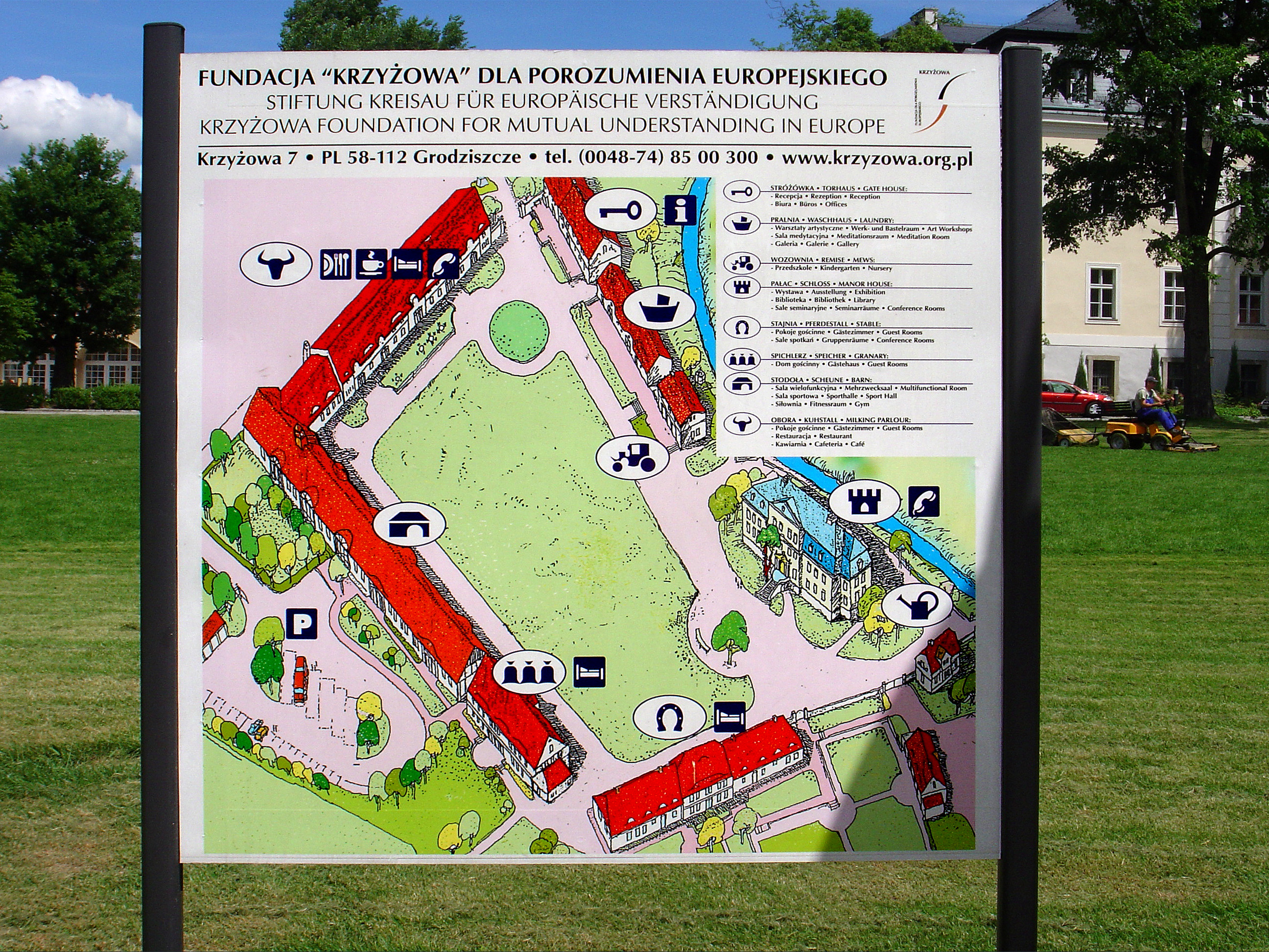 Plan des Geländes der IJBS Kreisau